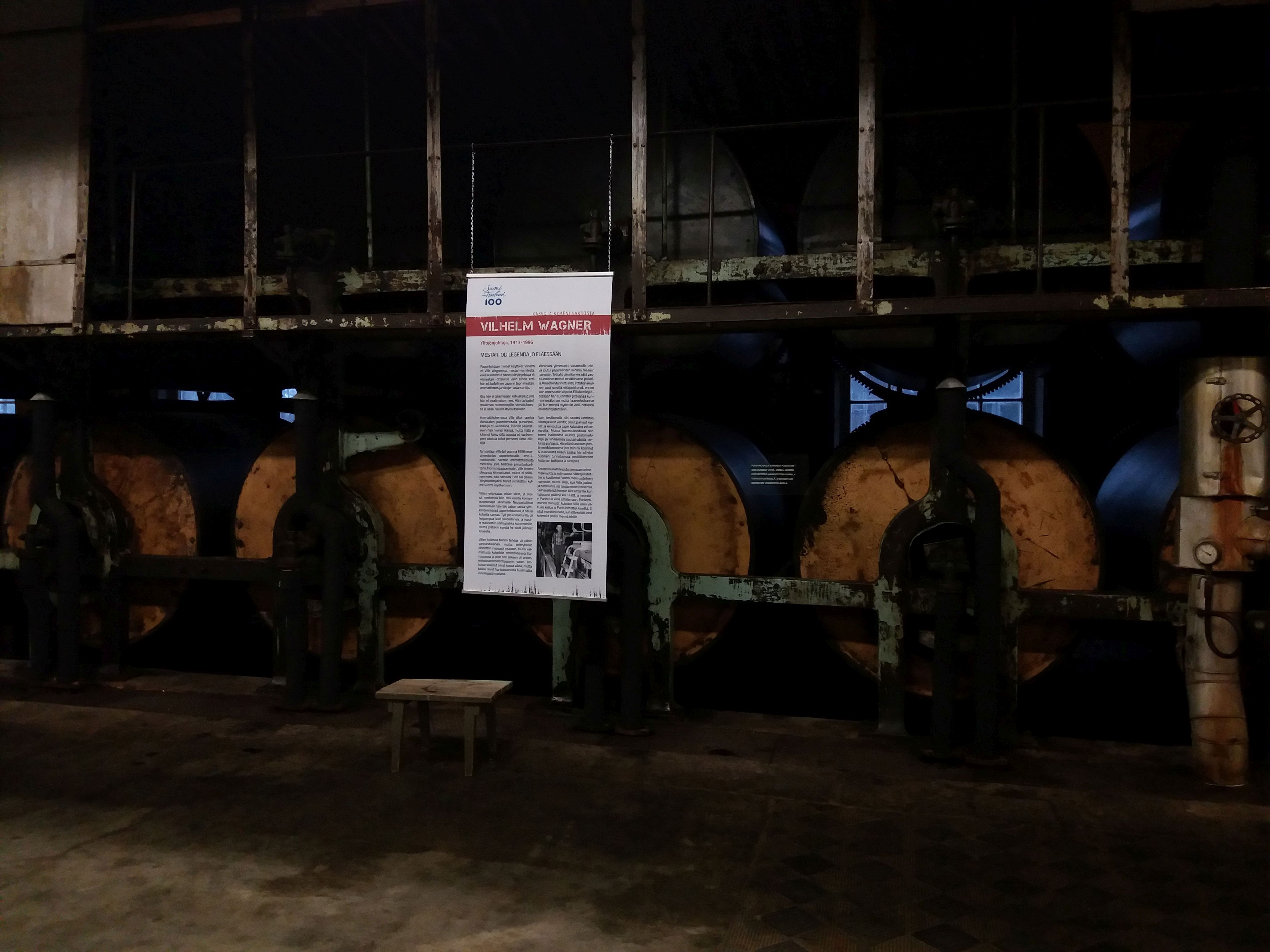 Suomen ensimmäinen jatkuvakäyttöinen kartonkikone museoituna omalle paikalleen.